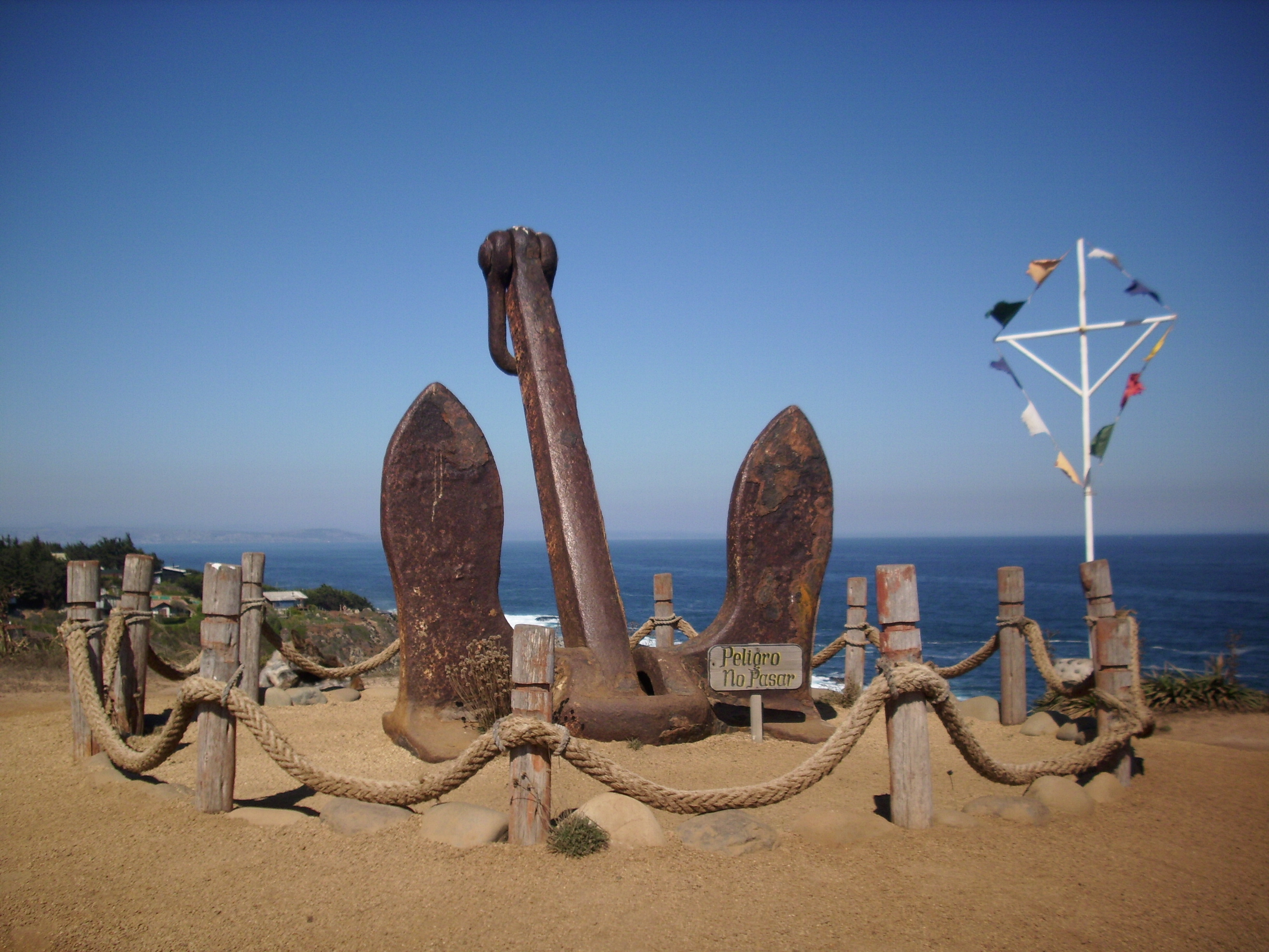 Un ancla instalada en los terrenos de Cantalao, proyecto artístico y cultural impulsado en Isla Negra por el poeta chileno Pablo Neruda. Fotografía del 17 de abril de 2012.